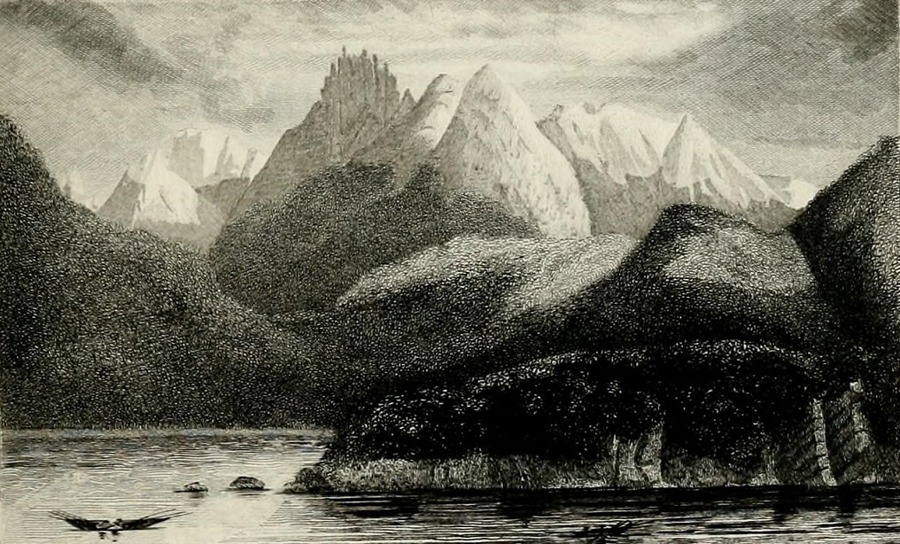 Puerto de Hambre 1827, vista norte, en el Estrecho de Magallanes, durante la expedición del almirante Phillip Parker King, tomado del libro "Narrative of the surveying voyages of His Majesty's Ships Adventure and Beagle between the years 1826 and 1836, describing their examination of the southern shores of South America, and the Beagle's circumnavigation of the globe. Proceedings of the first expedition, 1826-30, under the command of Captain P. Parker King, R.N., F.R.S. London: Henry Colburn".